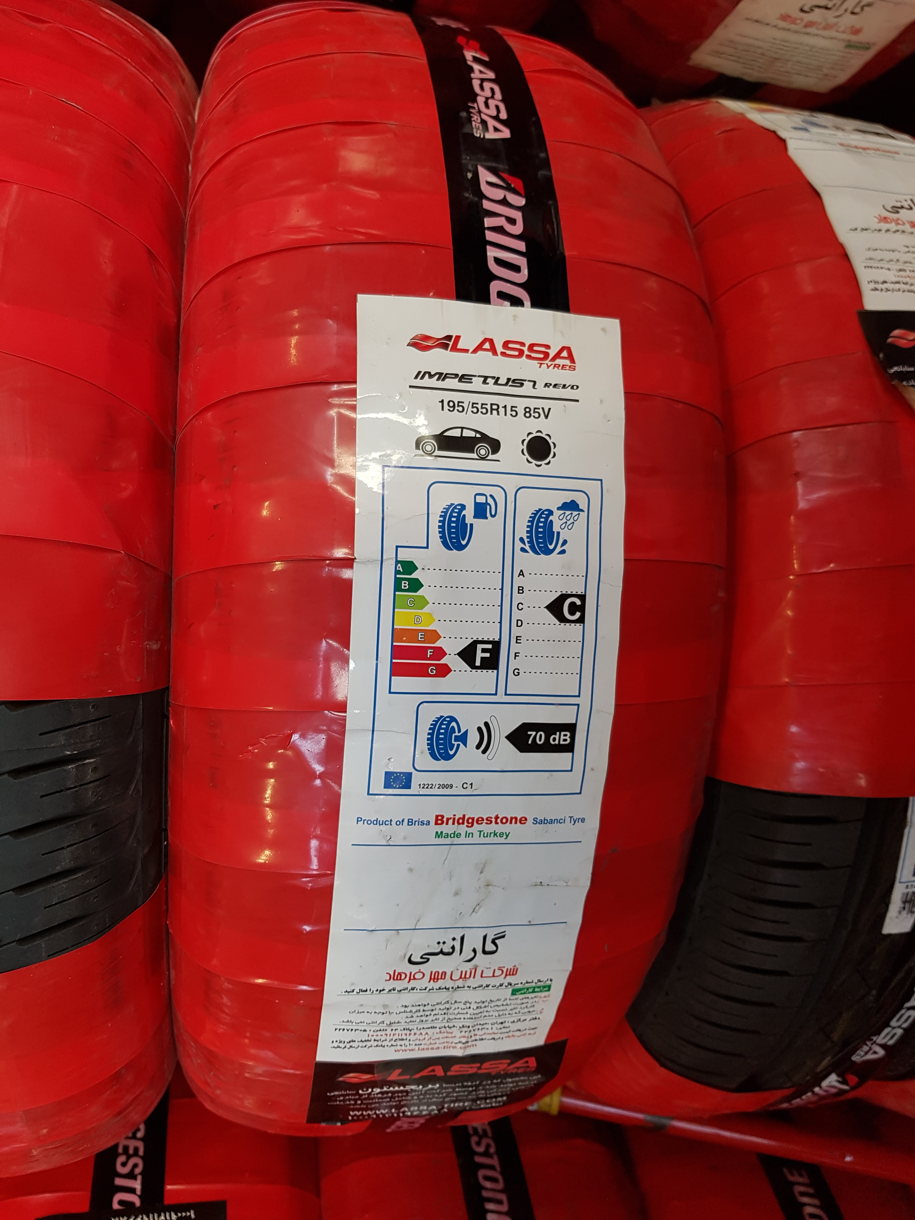 لیبل لاستیک